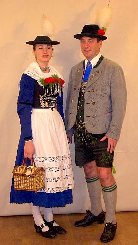 Ein Pärchen in Miesbacher Tracht